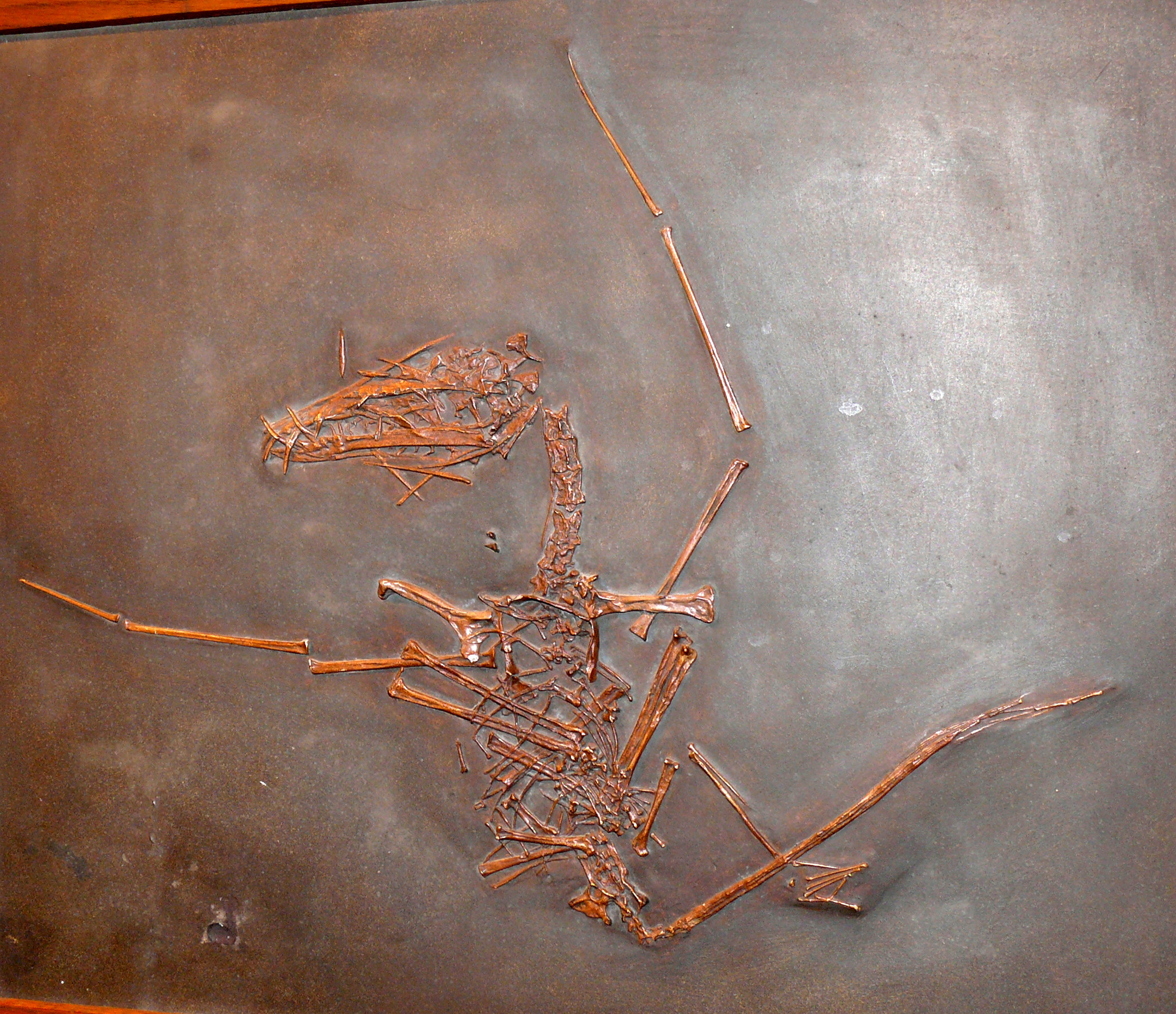 Dorygnathus banthensis, unterer oder schwarzer Jura, etwa 188 Millionen Jahre alt, Holzmaden, Württemberg